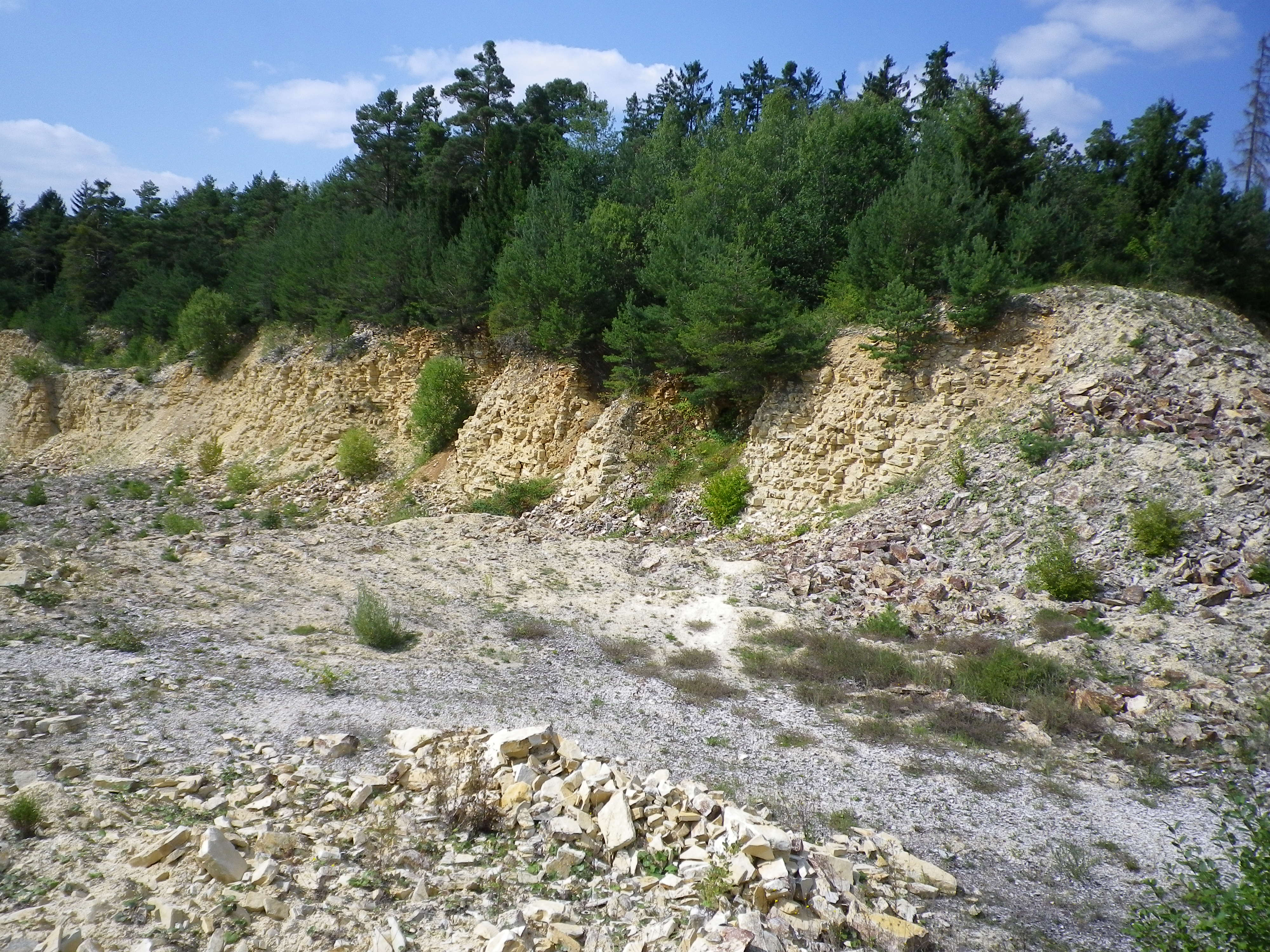 Geotop bei Hitzhofen